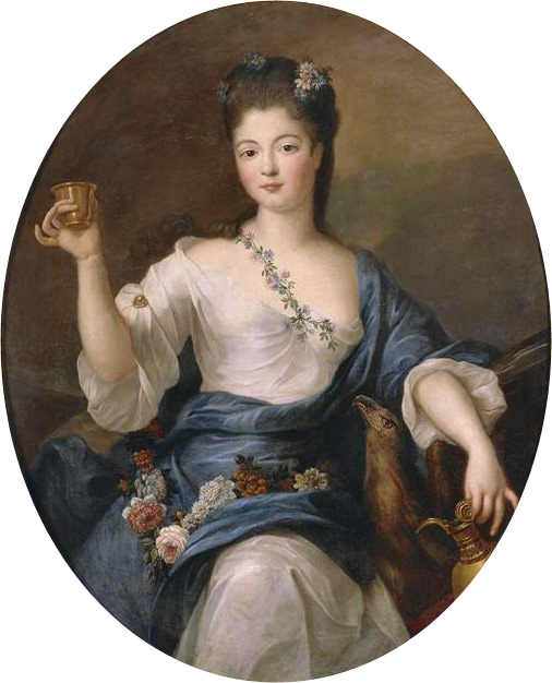 Portrait de Charlotte Aglaé d'Orléans, duchesse de Modène (1700-1761) - en Hébé